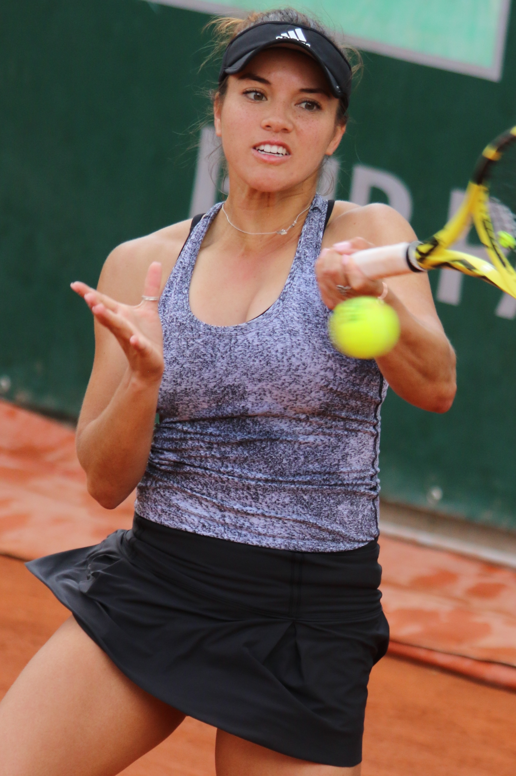 Krawczyk RG19 (17)